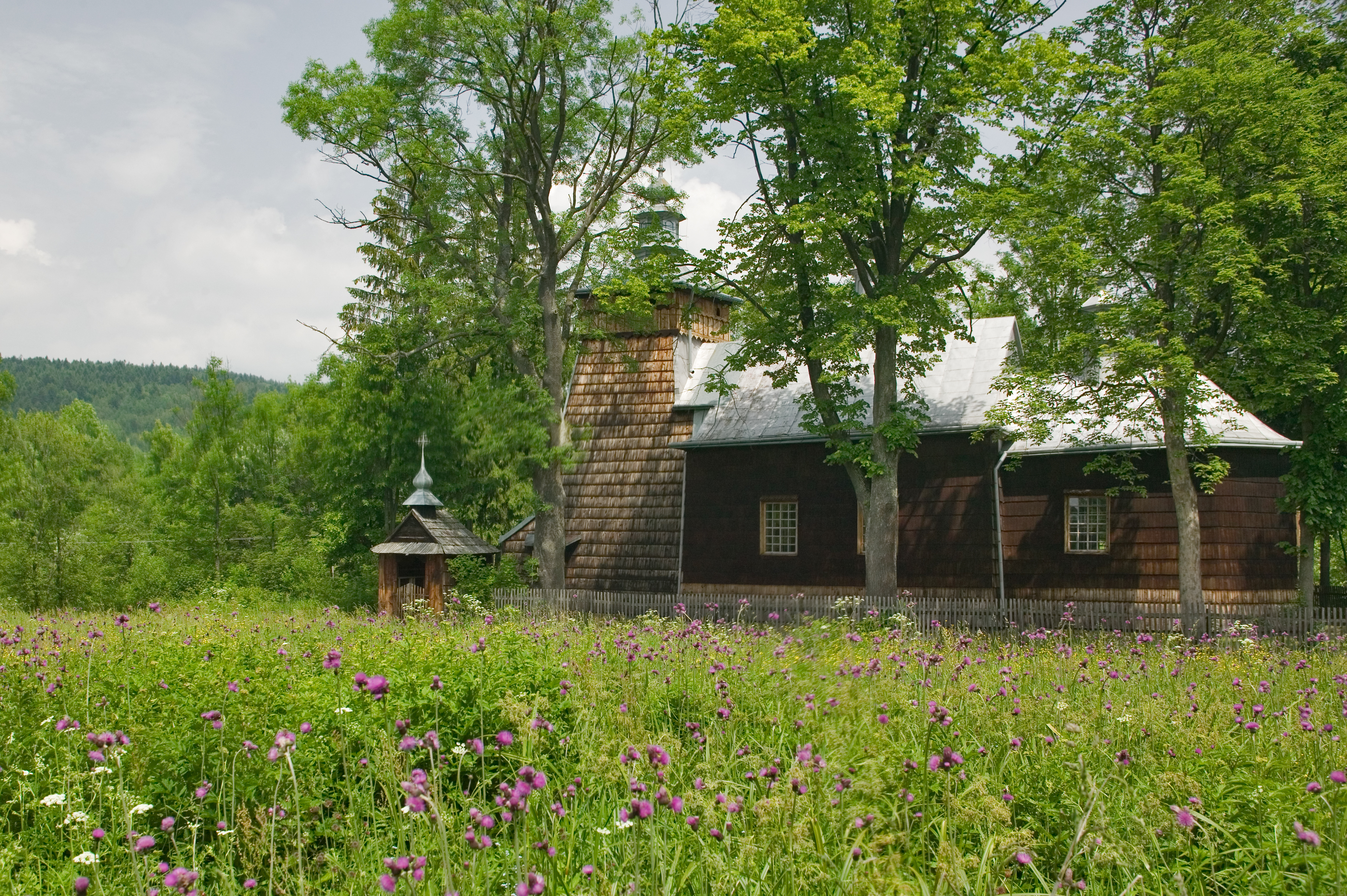 Nowica, cerkiew greckokatolicka pod wezwaniem św. Paraskewy